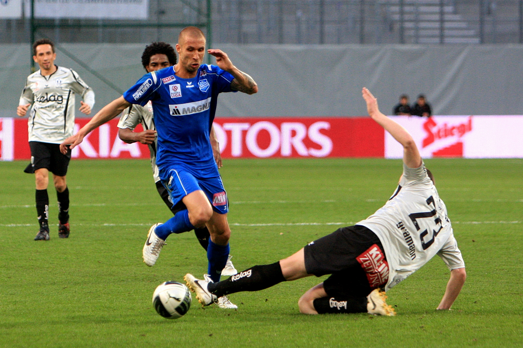 Österreichischer Fußball-Cup 2009/10: Semifinale SK Austria Kärnten gegen SC Magna Wiener Neustadt (0:3) – Wiener Neustadts Nationalteamspieler Patrick Wolf kann von Daniel Gramann (rechts) nicht gestoppt werden. Sandro (dahinter) und Matthias Dollinger (links) beobachten die Szene.